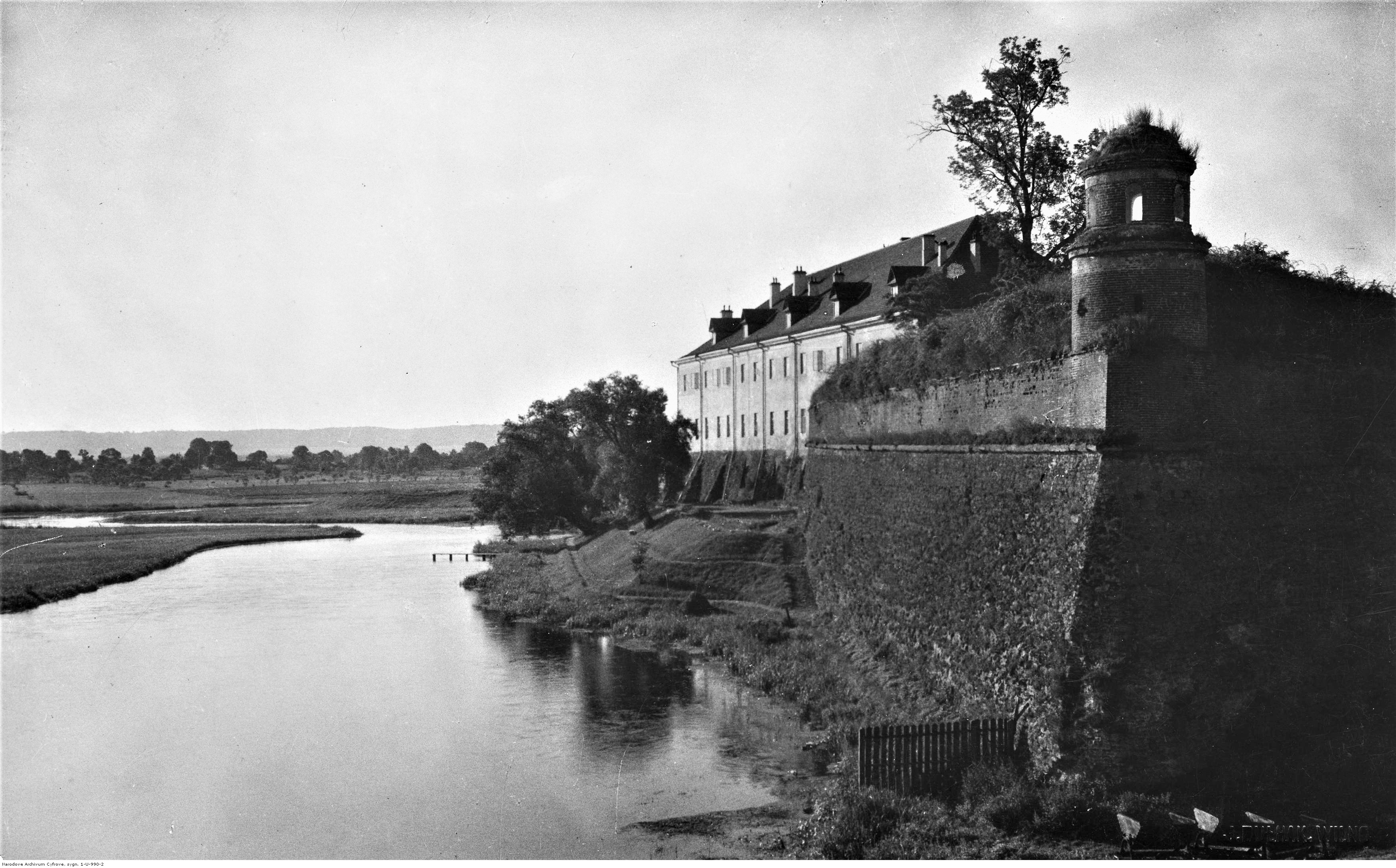 Dubno, województwo wołyńskie. Zamek Ostrogskich - widok od strony rzeki Ikwy. Koncern Ilustrowany Kurier Codzienny - Archiwum Ilustracji. Sygnatura: 1-U-990-2